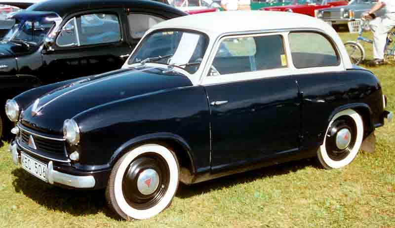 Lloyd LP 400 S 1954